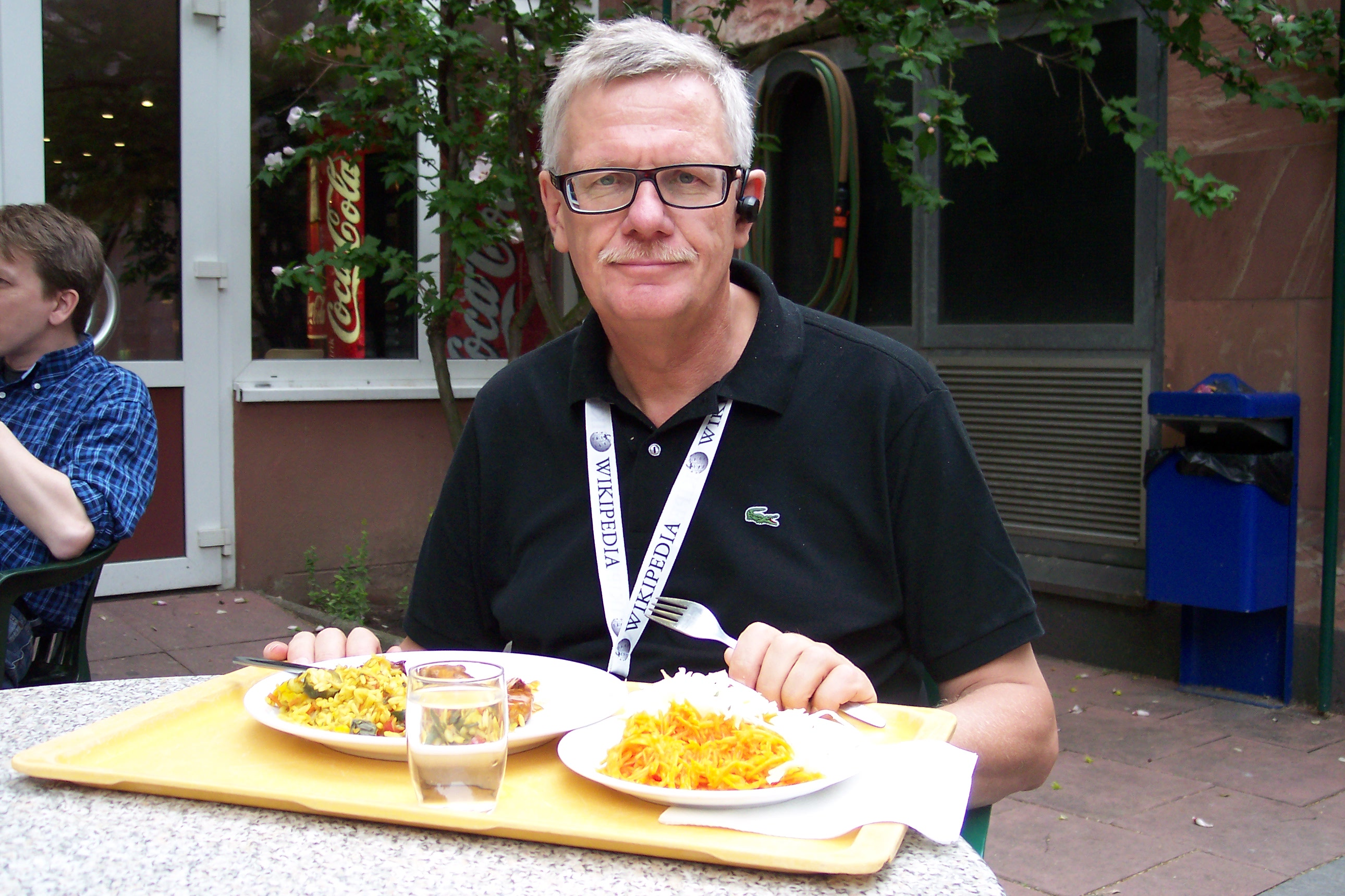 Drozdp und sein Kampf mit dem Mittagessen